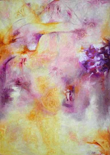 Pintura al Óleo